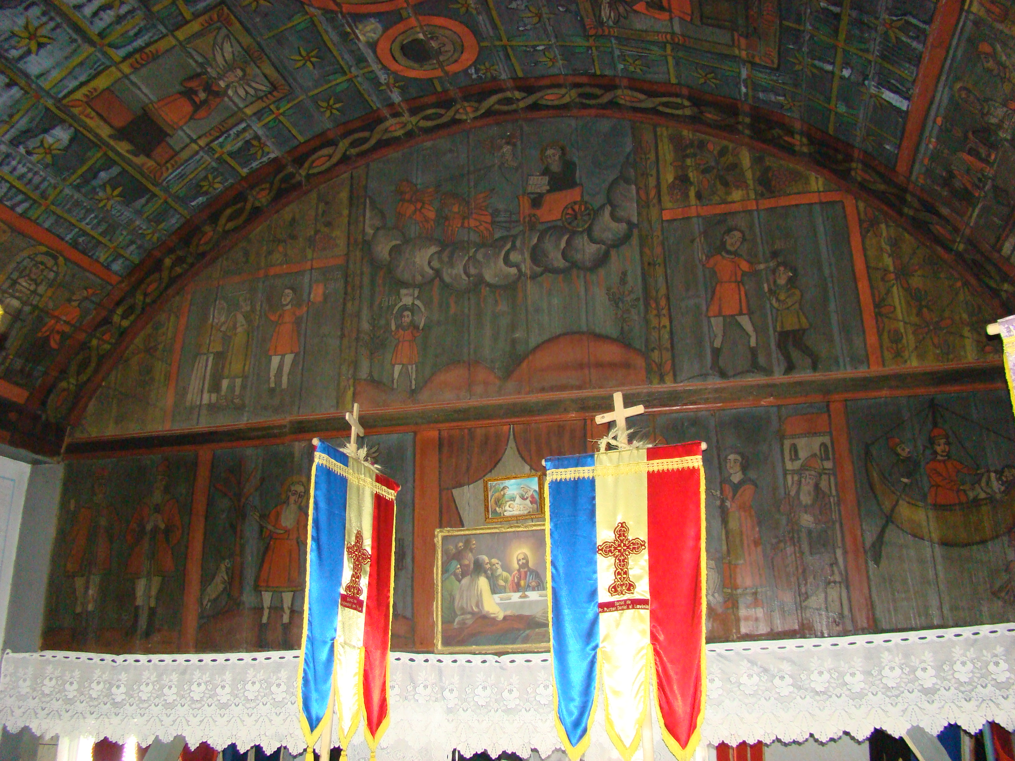 Biserica de lemn „Sf.Dumitru” din Păușa, județul Bihor